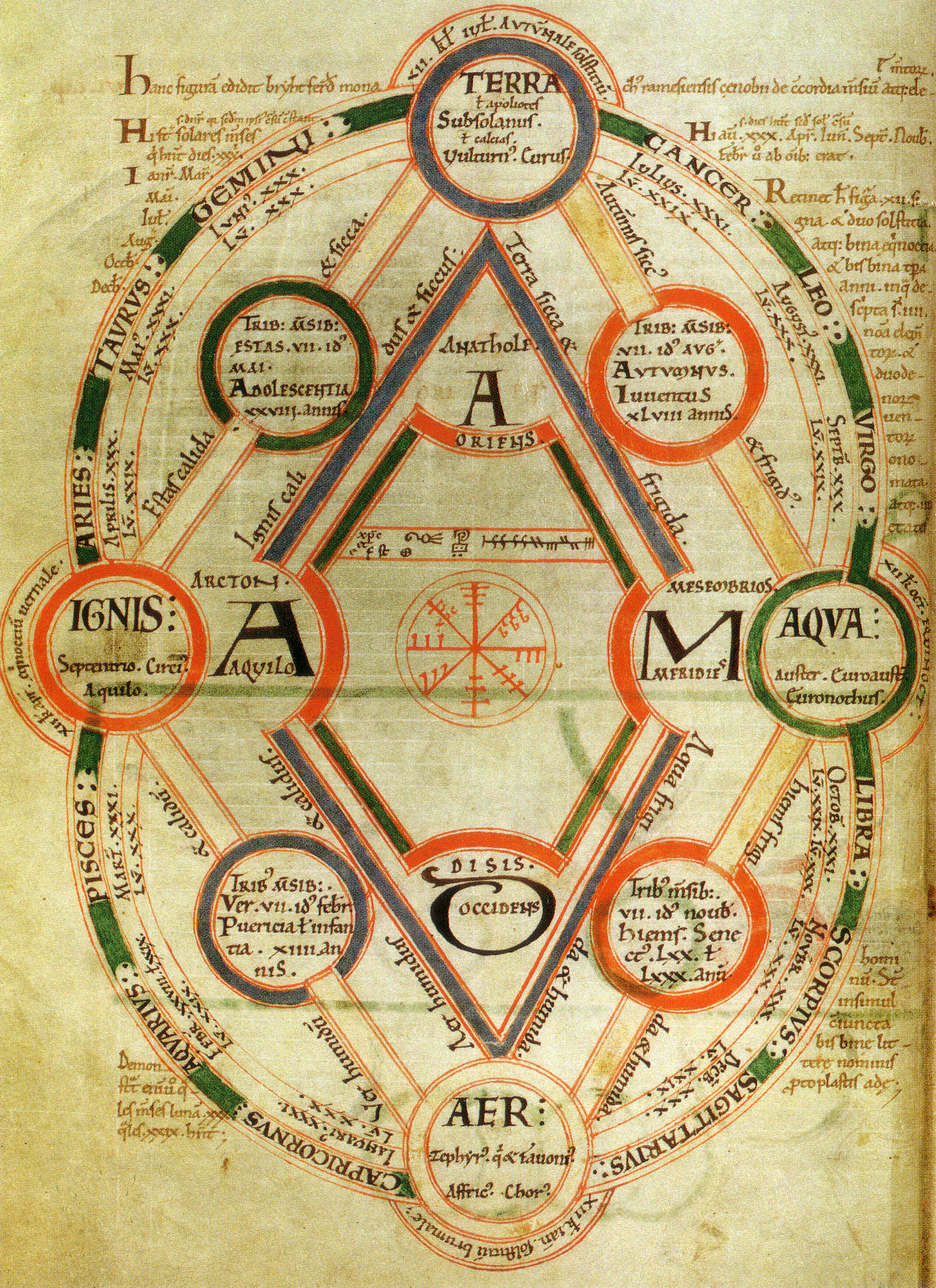 Diagramme de Byrthferth : les mystères de l'univers. Adam (centre), les quatre points cardinaux (nord à gauche), les quatre éléments (terre, eau, air, feu), les quatre saisons et les quatre âges correspondants de la vie, et enfin les douze signes du zodiaque. Byrthferth de Ramsey, Enchiridion, XIe siècle - manuscrit : Angleterre, vers 1080